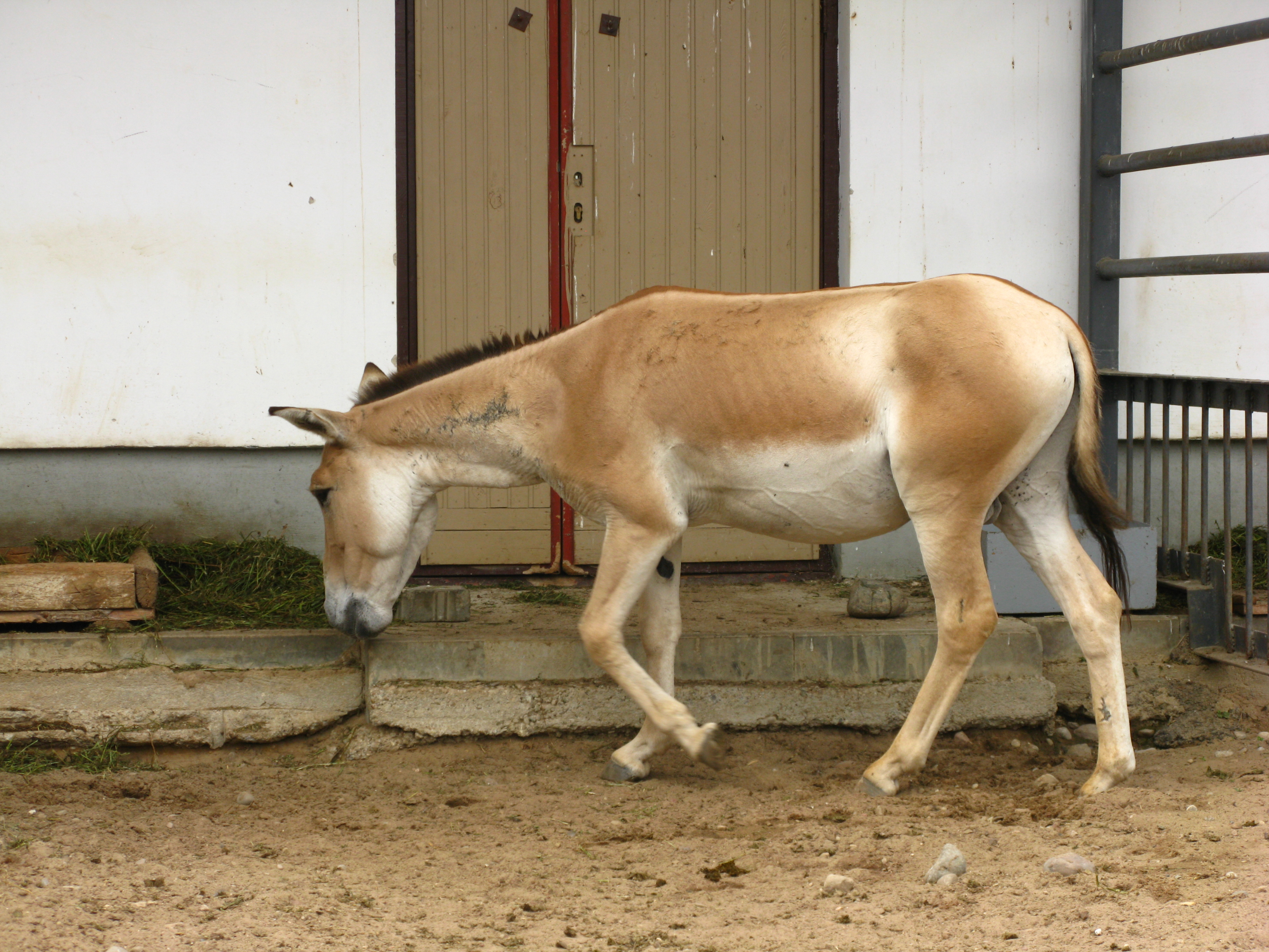 Туркменский кулан (Equus hemionus kulan) в зоопарке города Гродно, Беларусь.